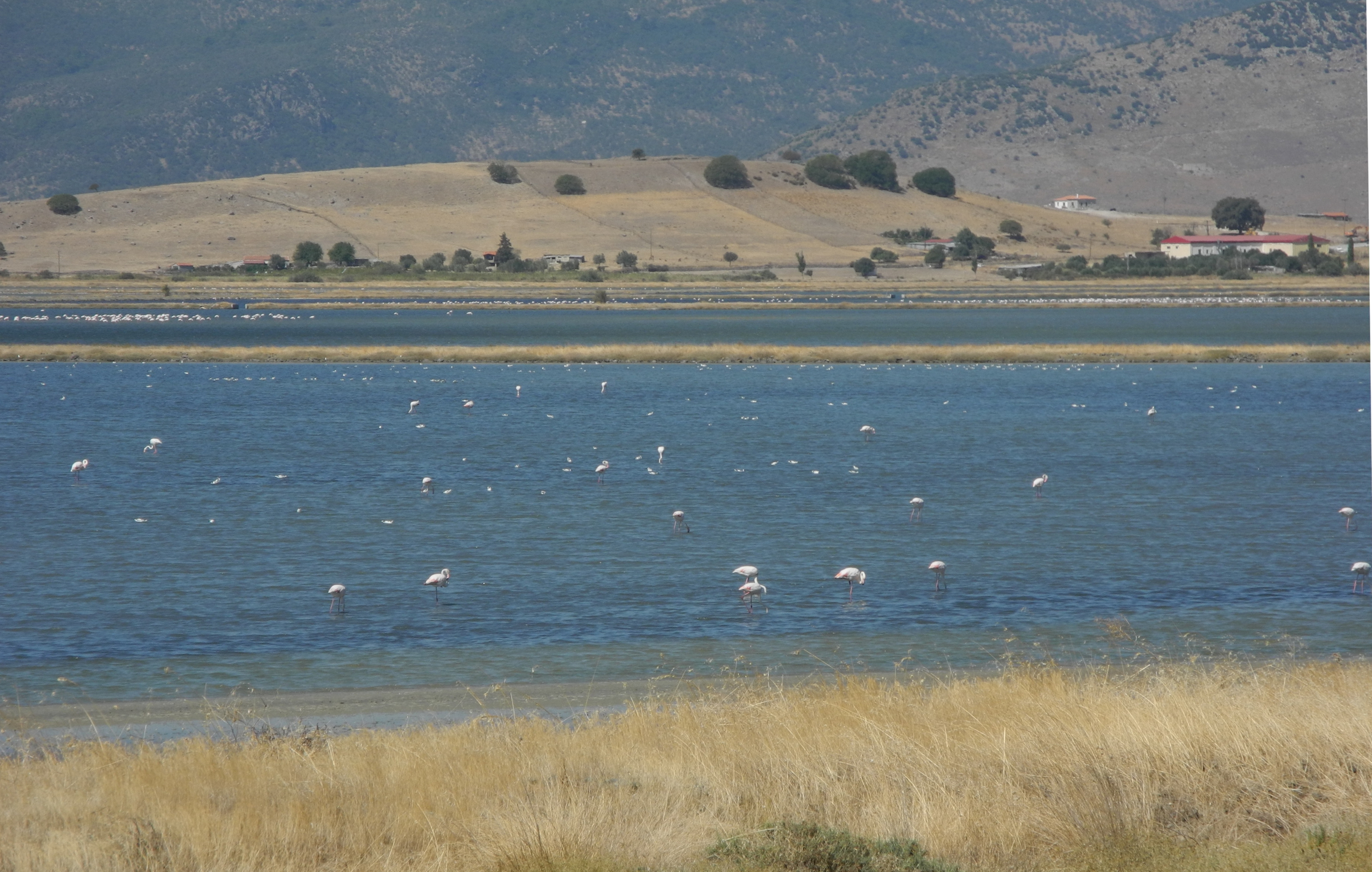 Φοινικόπτερα στις αλυκές στα βόρεια του κόλπου της Καλλονής.